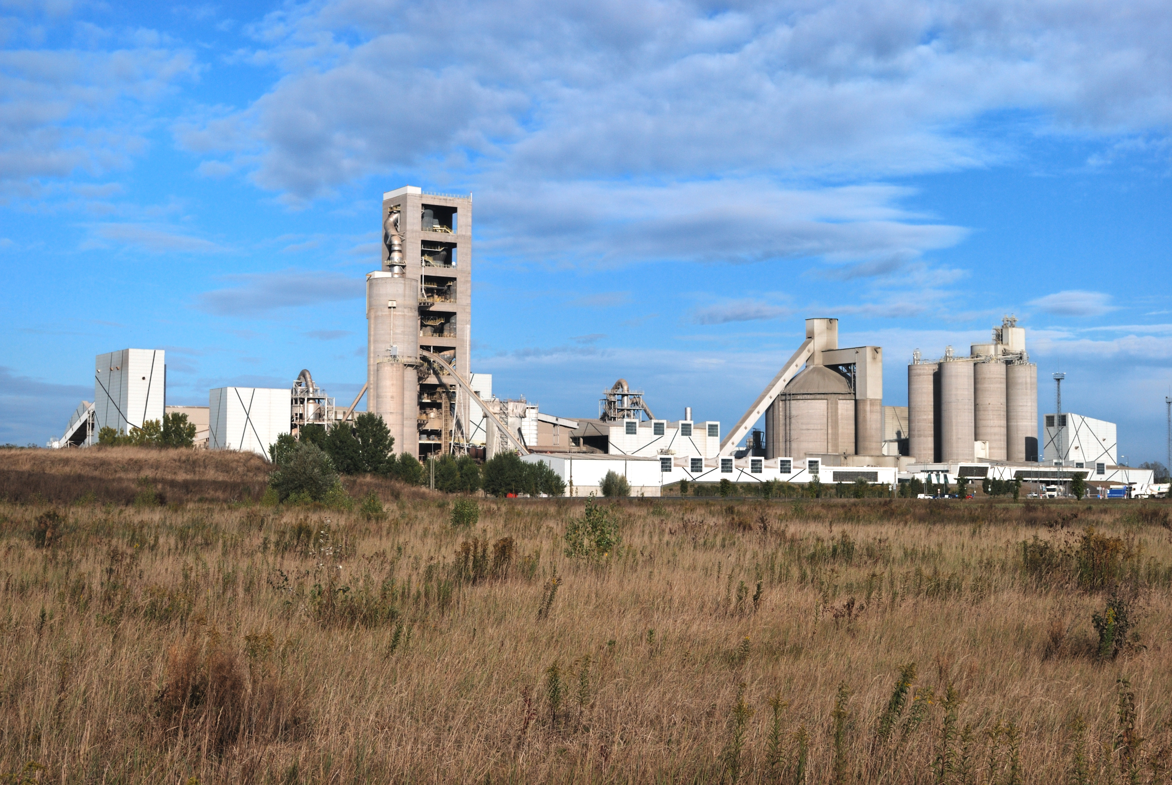 Lafarge cementgyár, Királyegyháza